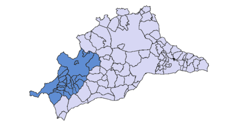 Comarca de la Serranía de Ronda según la Junta de Andalucía, en el decreto de 2003